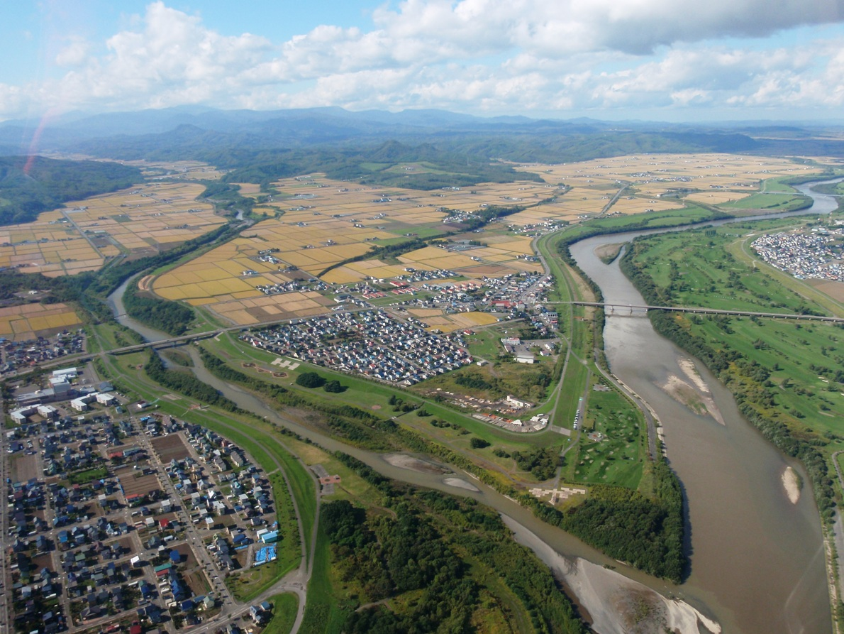 グライダーの体験試乗、滝川上空より石狩川・徳富川の合流点付近。